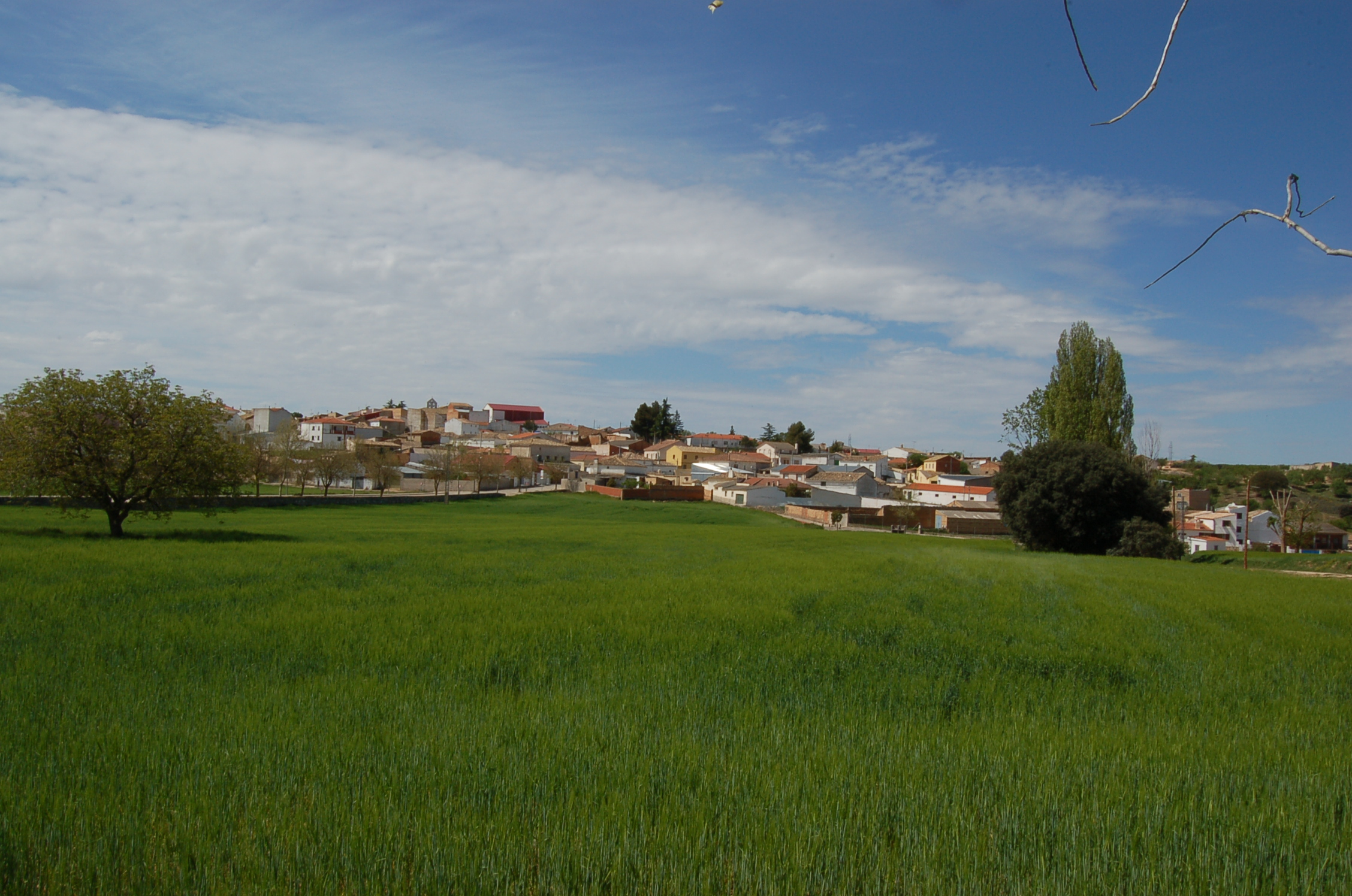 Vista de Villaverde y Pasaconsol